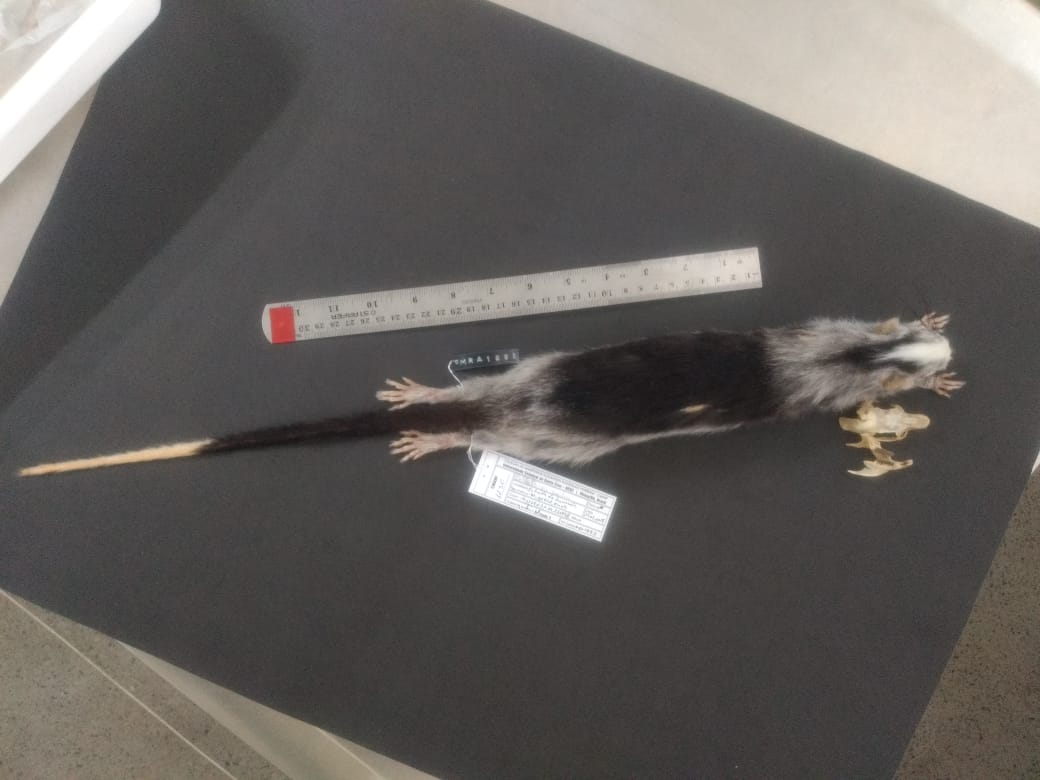 Espécime de Callystomys pictus preservado na Coleção de Mamíferos Alexandre Rodrigues Ferreira da Universidade Estadual de Santa Cruz. Nº 1230.